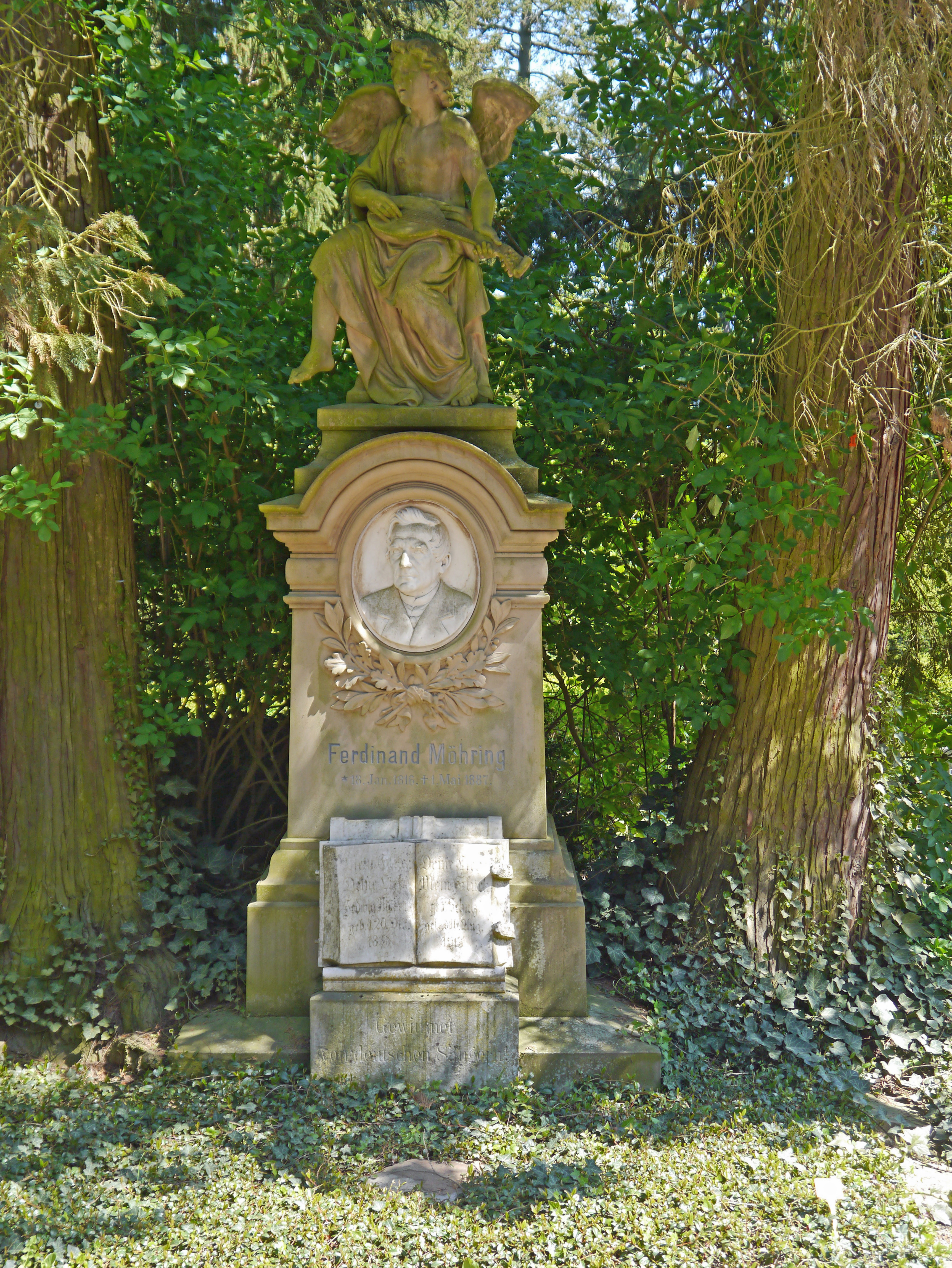 Das Grabmal für Ferdinand Möhring (1816-1887). Bildhauer: Hermann Schies. Auf dem Nordfriedhof Wiesbaden.